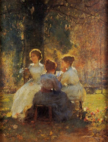 Figures in a landscape by Vittorio Cavalleri